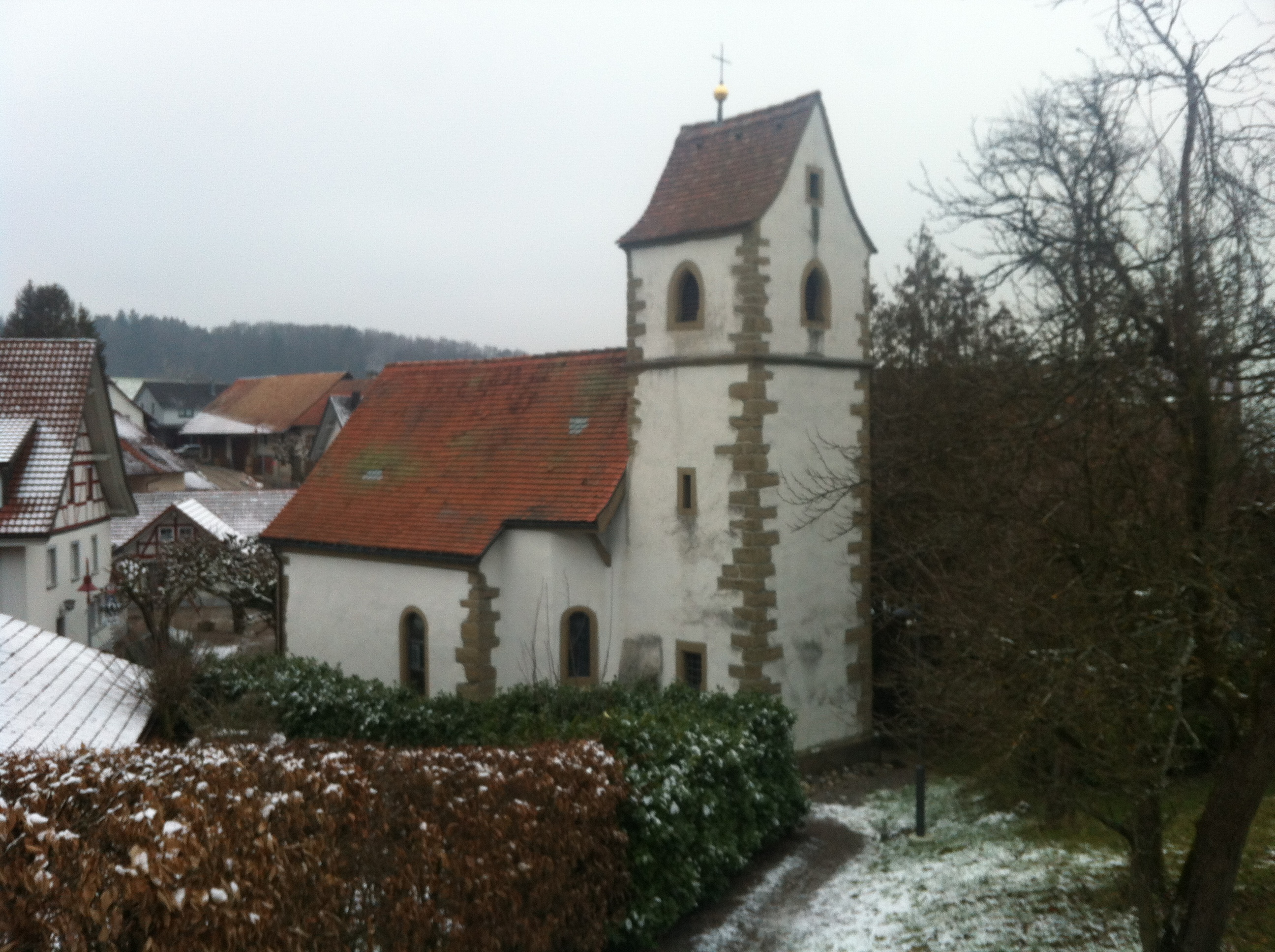 Bechtersbohl, Ortsteil der Gemeinde Küssaberg im Landkreis Waldshut in Baden-Württemberg. Katholische Kirche.